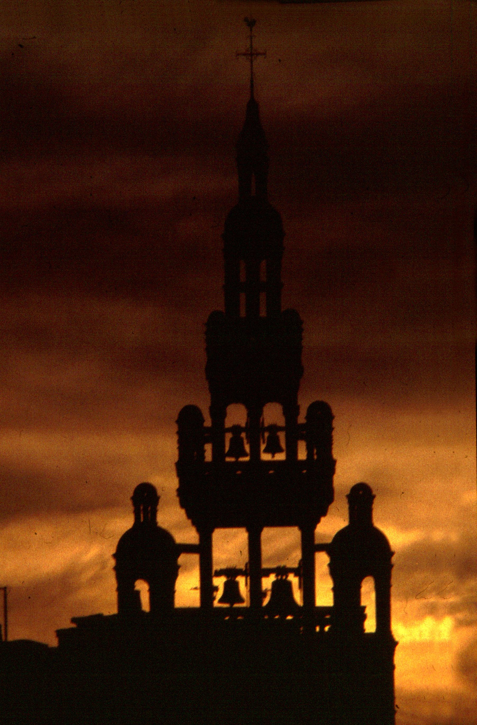 Roscoff, Notre-Dame de Croaz Batz 1978